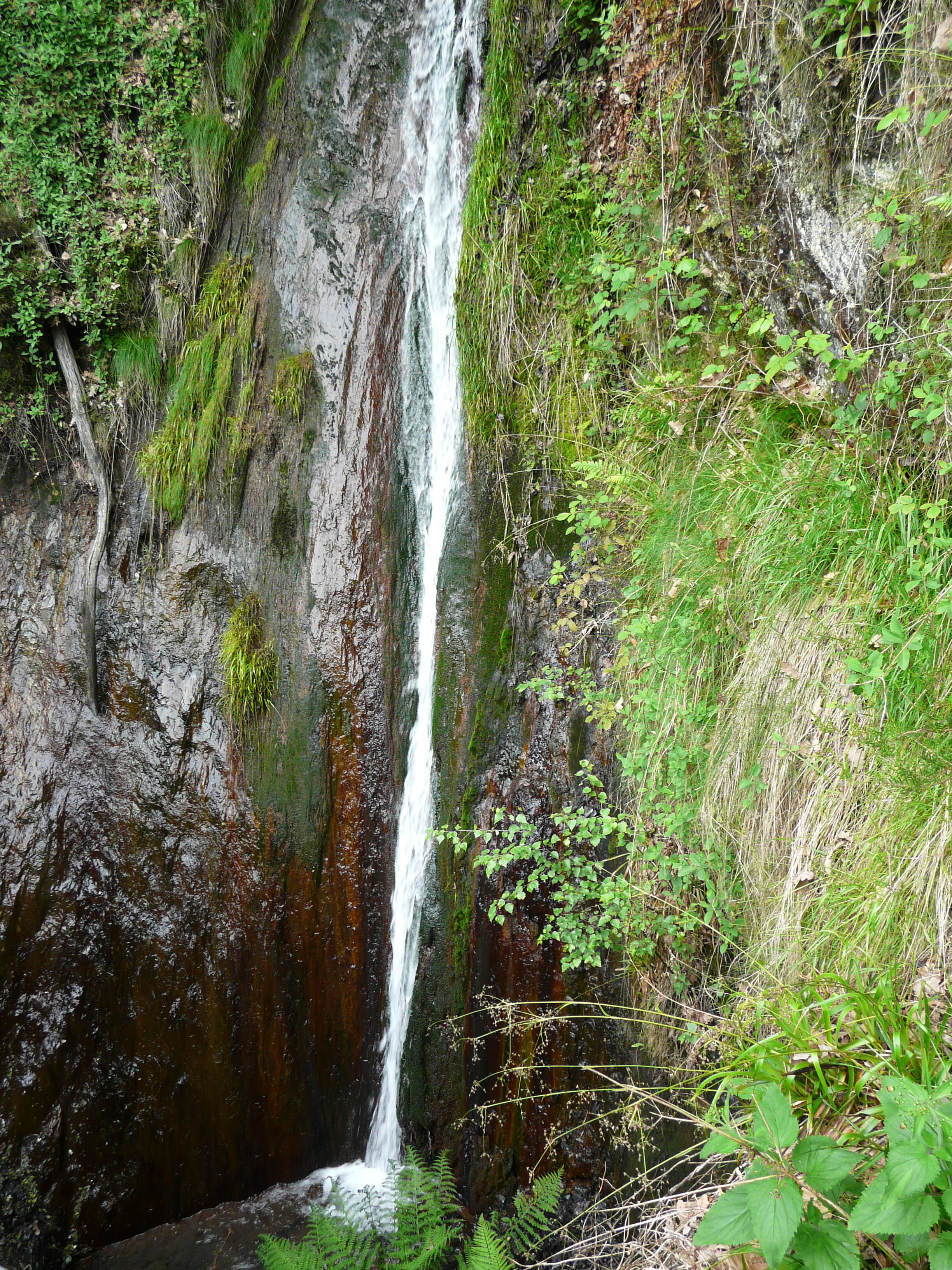 La cascade de Pech de Bayle, Gouaux-de-Luchon, Haute-Garonne, France.